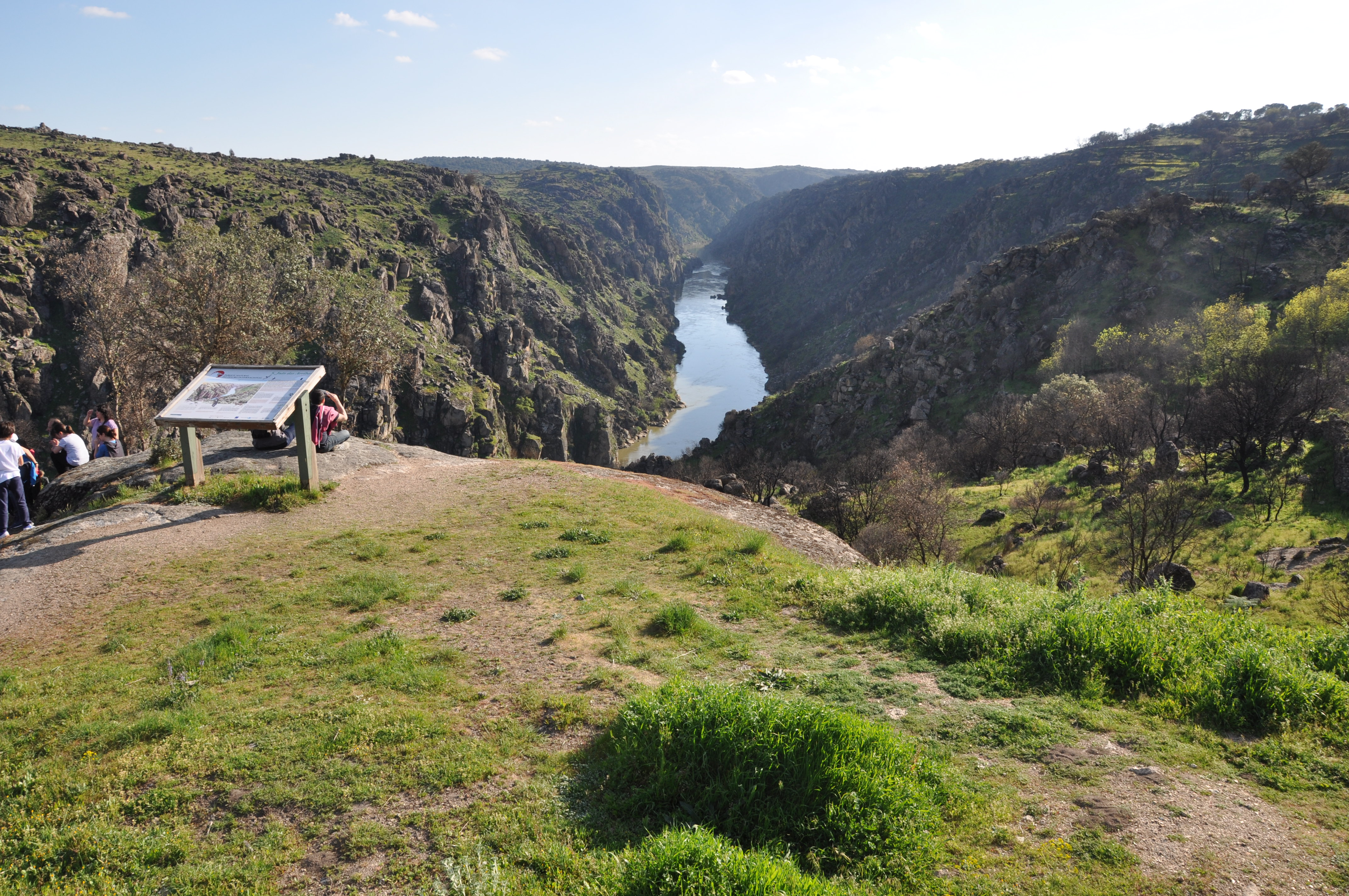 Mirador de San Juan de las Arribas sobre el río Duero, Aldeia Nova, Portugal.